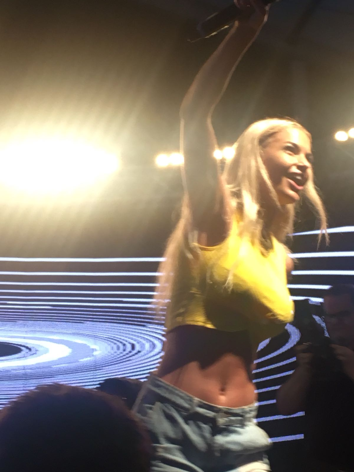 Isi Glück bei einem Auftritt beim Stoppelmarkt in Vechta